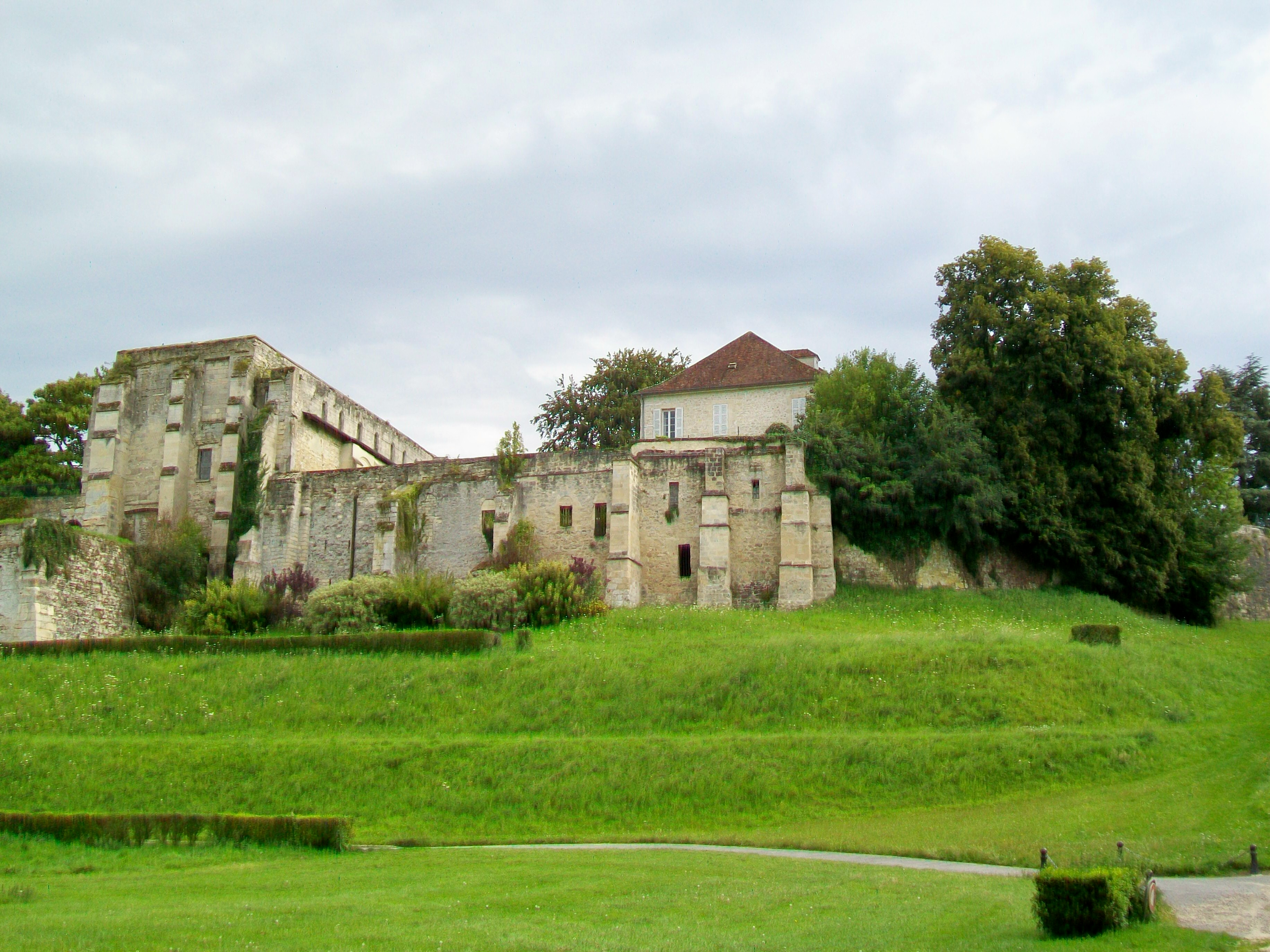 Le rempart nord (extrémité nord-ouest de la cité fortifiée), avec les vestiges du prieuré Saint-Arnoul.